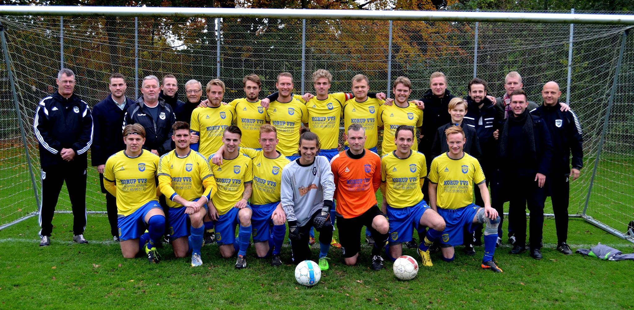 Ubberud Fodbold Herre Serie 1 sæson 15-16